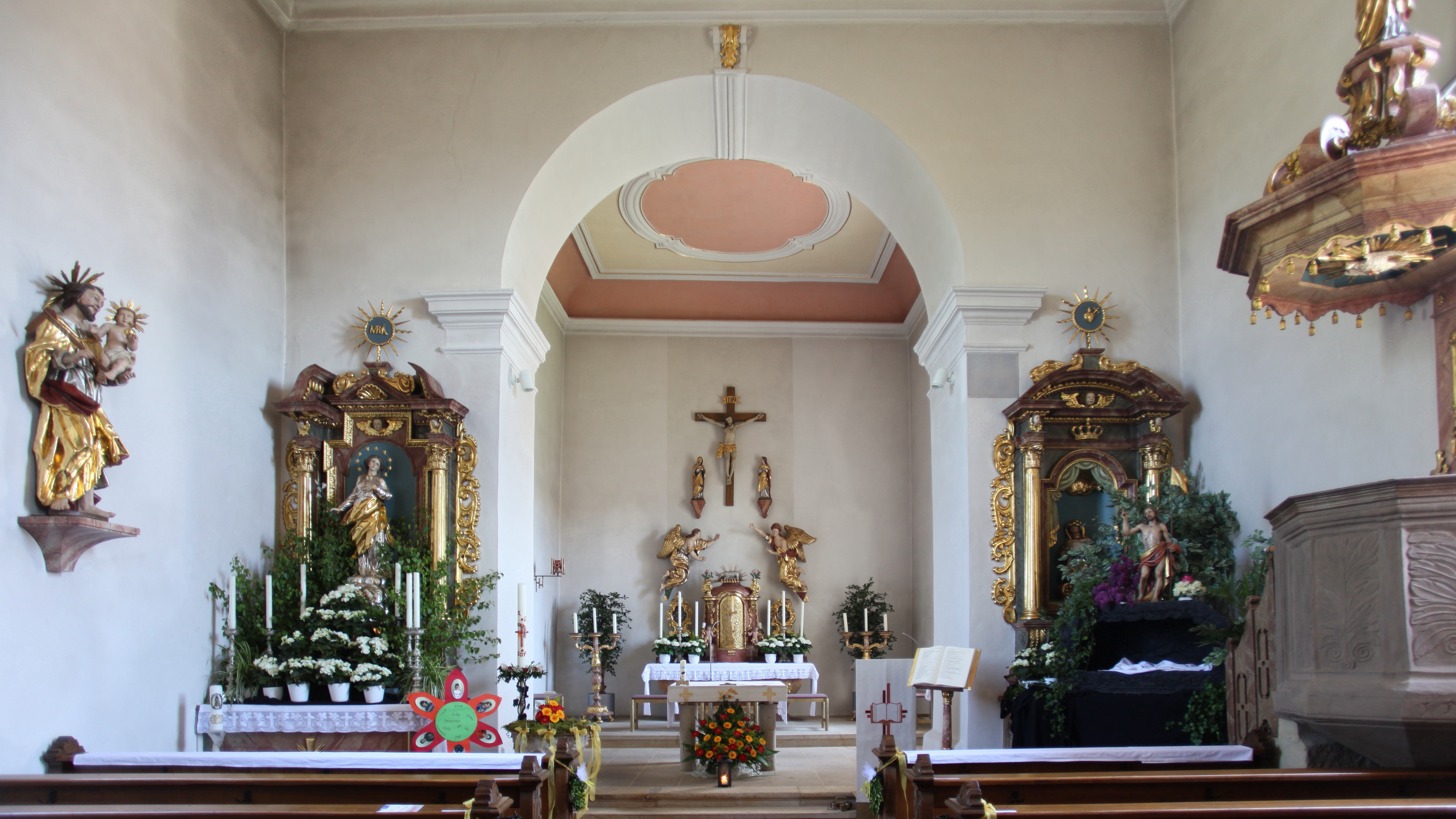 Pfarrkirche Mariä Geburt in Neundorf bei Weitramsdorf, Landkreis Coburg